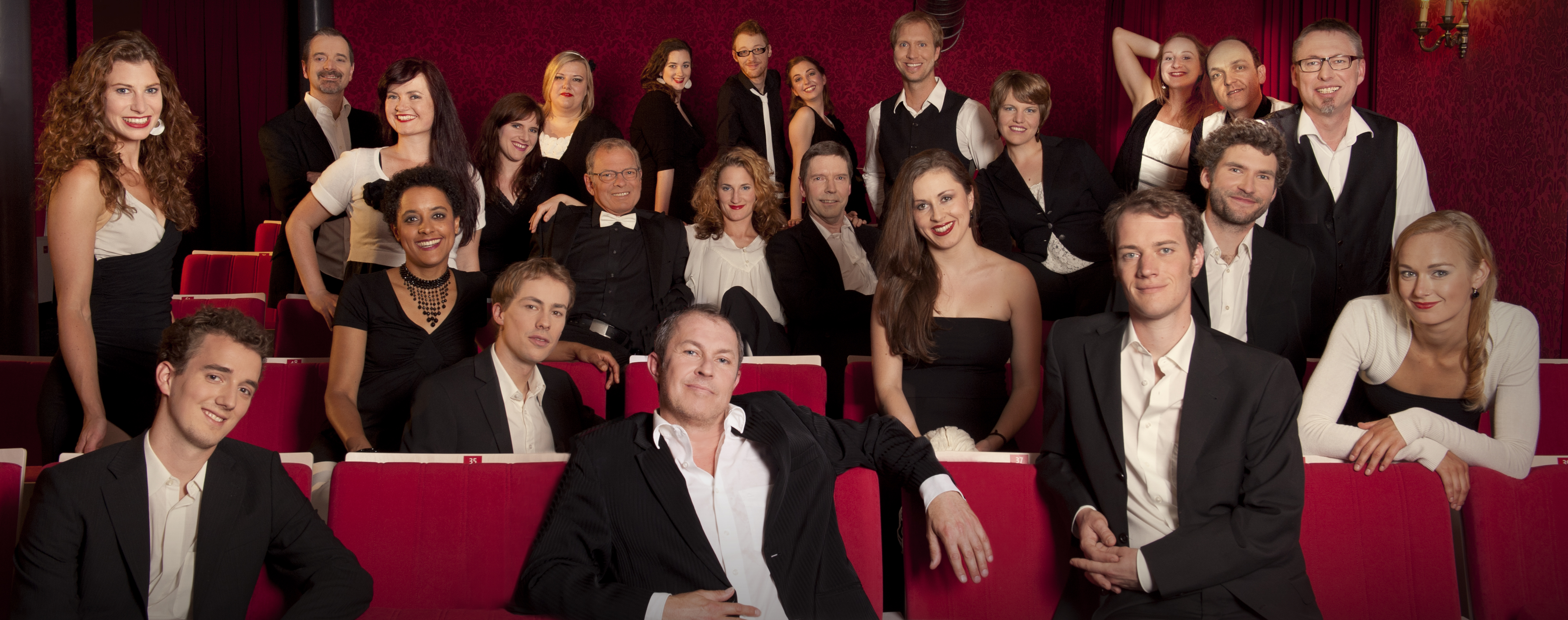 Jazzchor Freiburg. Fotograf: Markus Herb